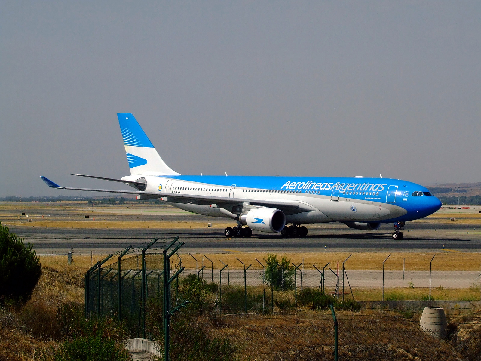 Airbus A330-200 (LV-FVH) de Aerolíneas Argentinas tras aterrizar en el aeropuerto Adolfo Suárez Madrid-Barajas (MAD/LEMD).